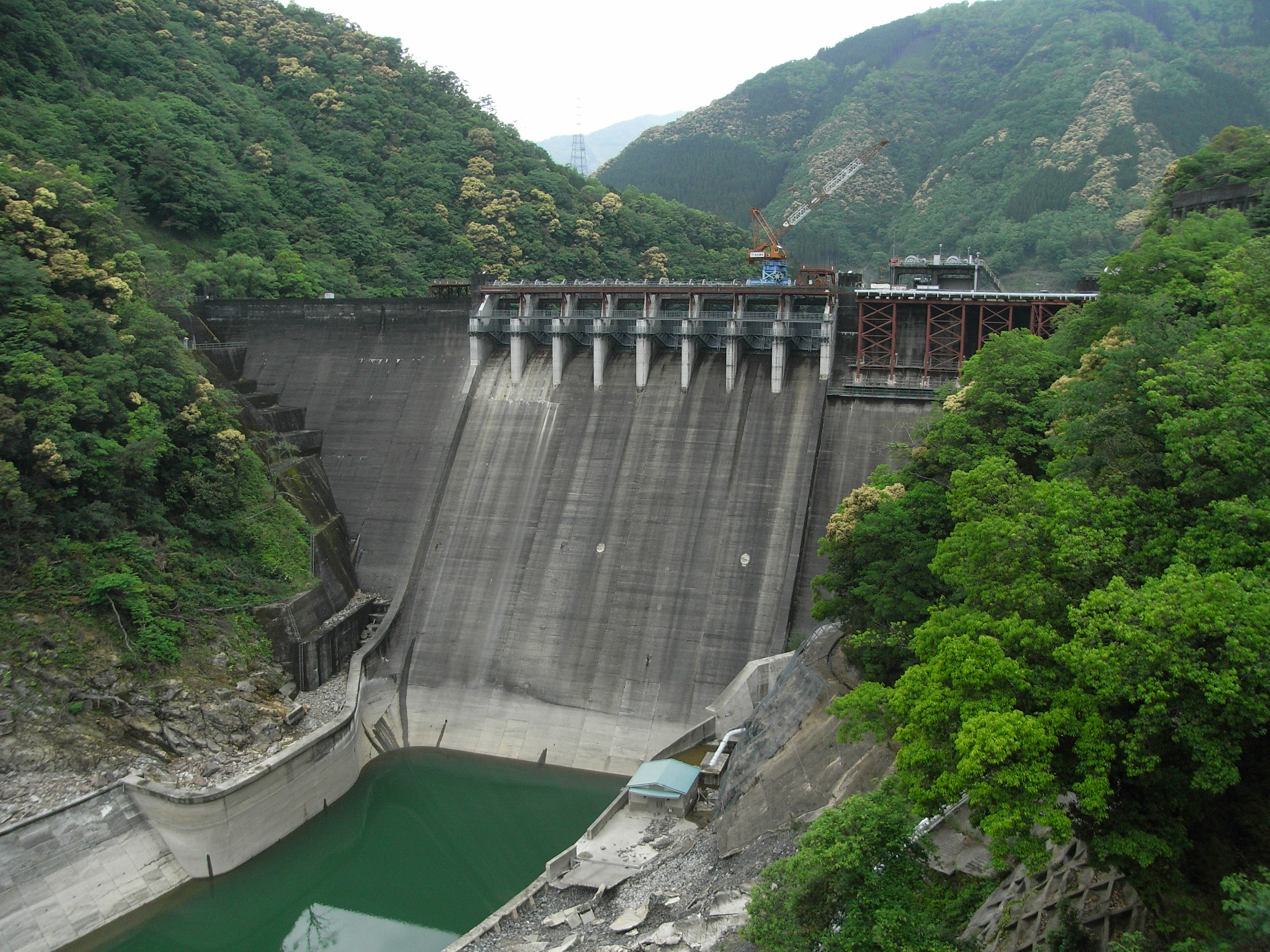 Dam